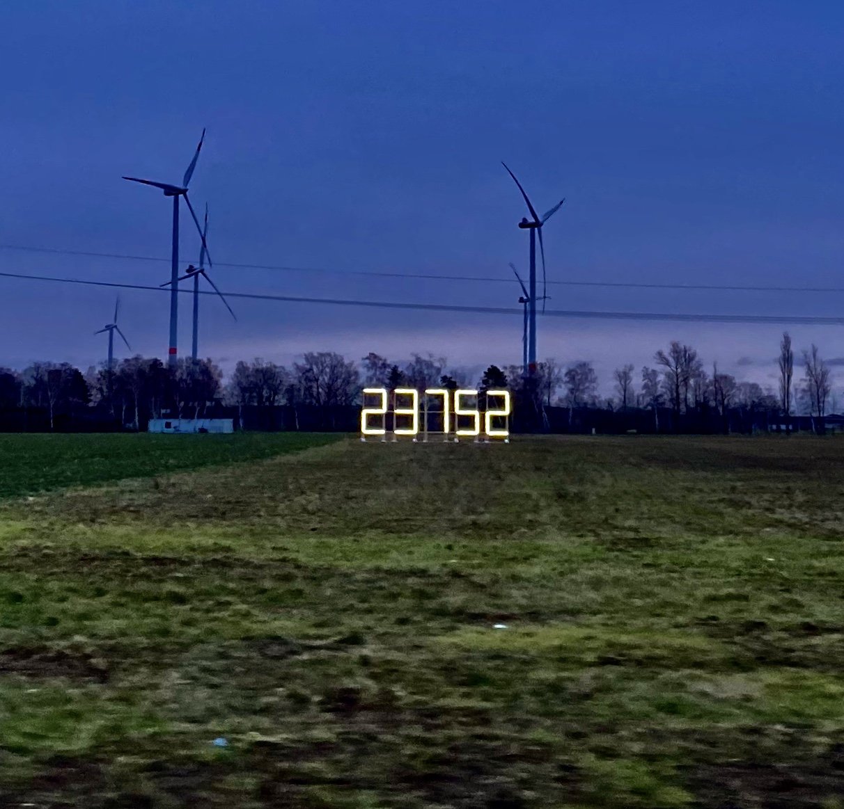 Opfergedenken Ehrenhain Zeithain (#Lichter gegen die Dunkelheit 2020)